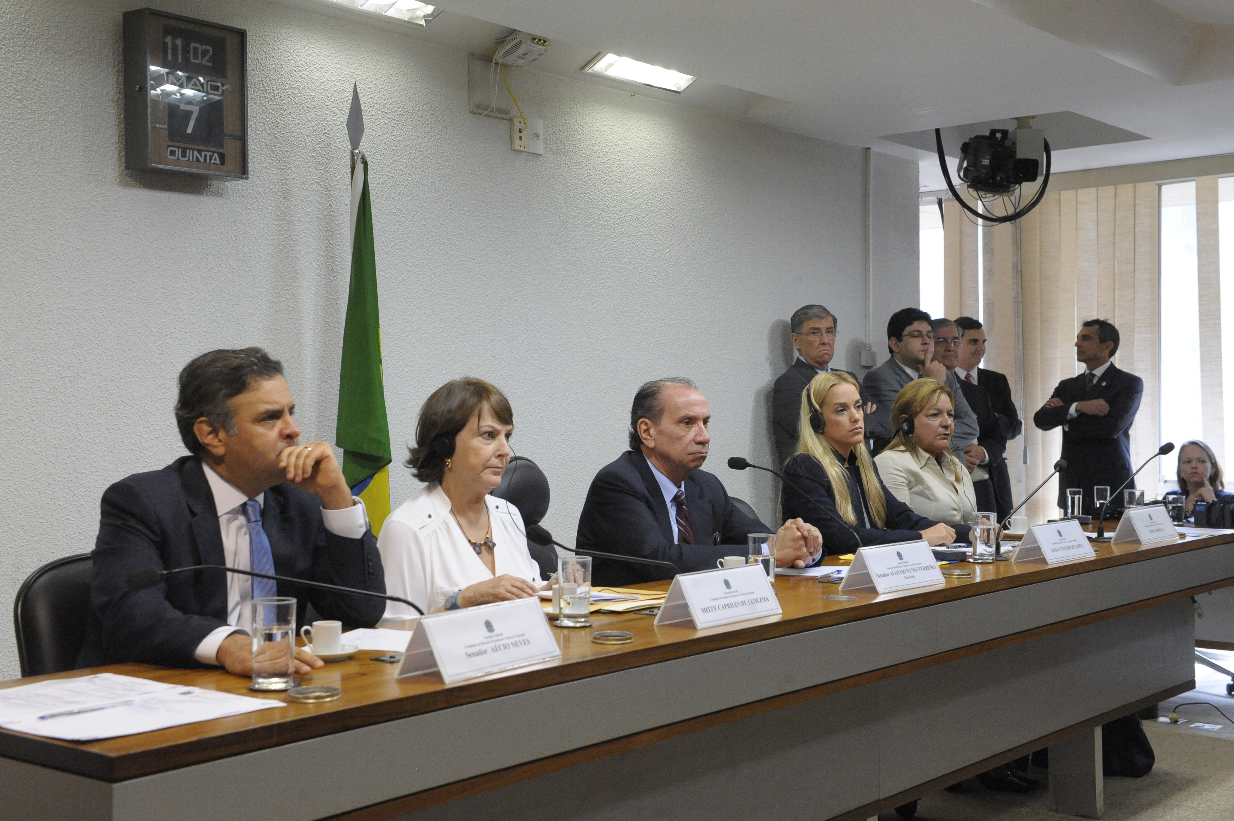 Sala de comissões do Senado Federal durante audiência pública interativa para tratar da situação política da Venezuela, que culminou com violações de direitos humanos e a prisão política de políticos oposicionistas ao governo nacional. Mesa: senador Aécio Neves (PSDB-MG); Mitzy Capriles de Ledezma; senador Aloysio Nunes (PSDB-SP); Lilian Tintori de Lopez; Rosa Orozco. Foto: Pedro França/Agência Senado